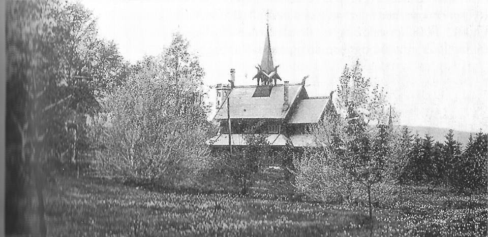 Den katolske kirken Vår Frue av det Gode Råds i Porsgrunn ca 1910.